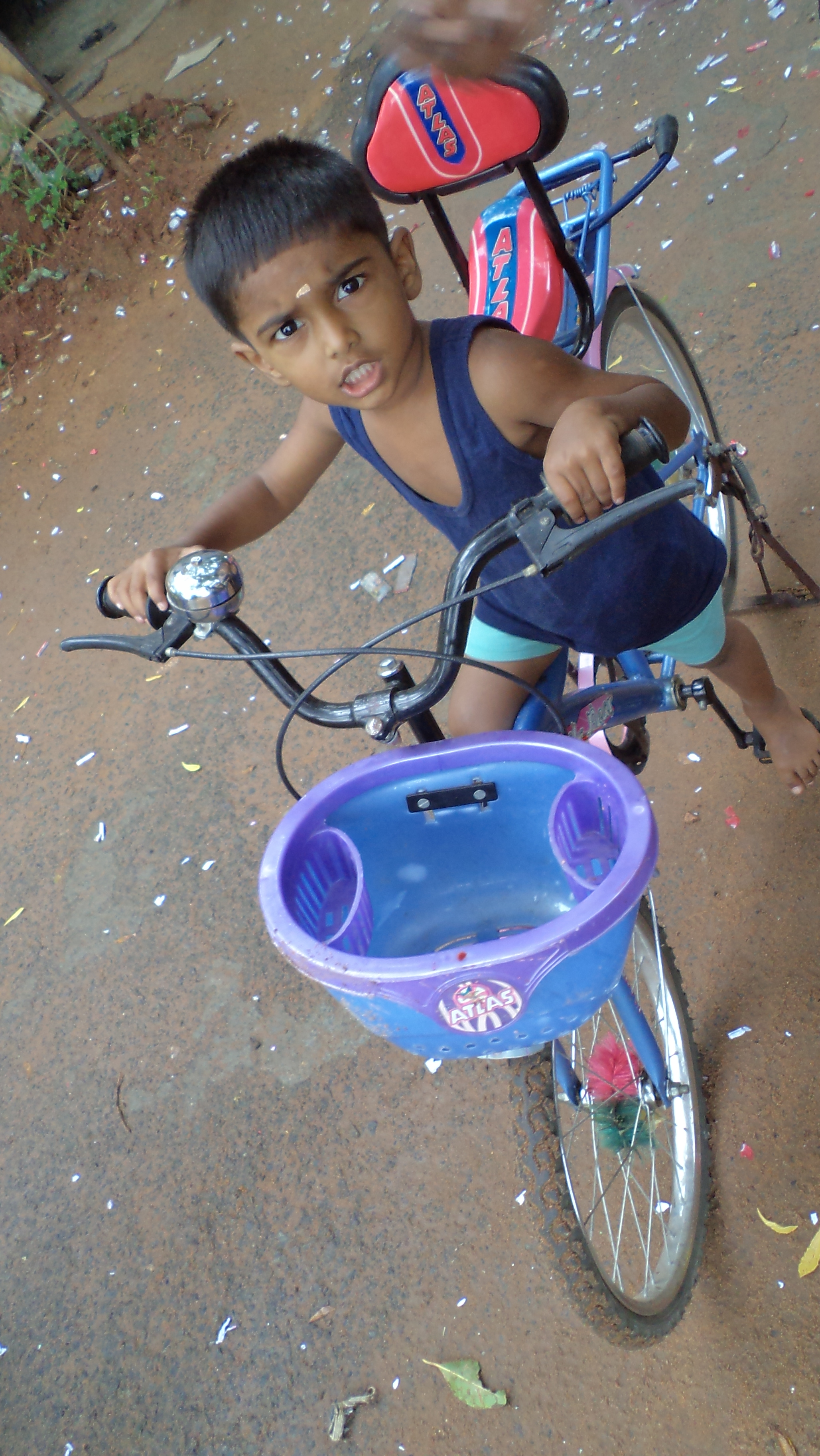 சிறுவர் சிறுமியர் ஒட்டி விளையாடும் மிதிவண்டி